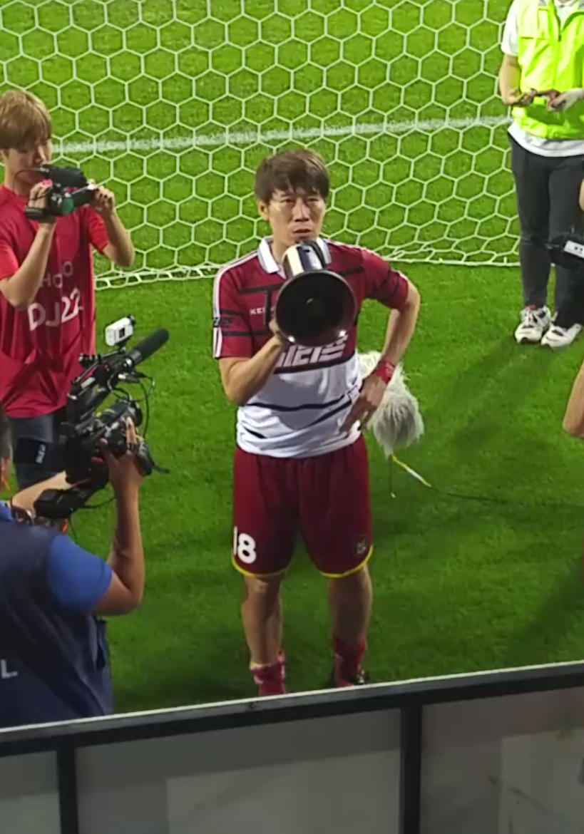 은퇴식 중인 김은중